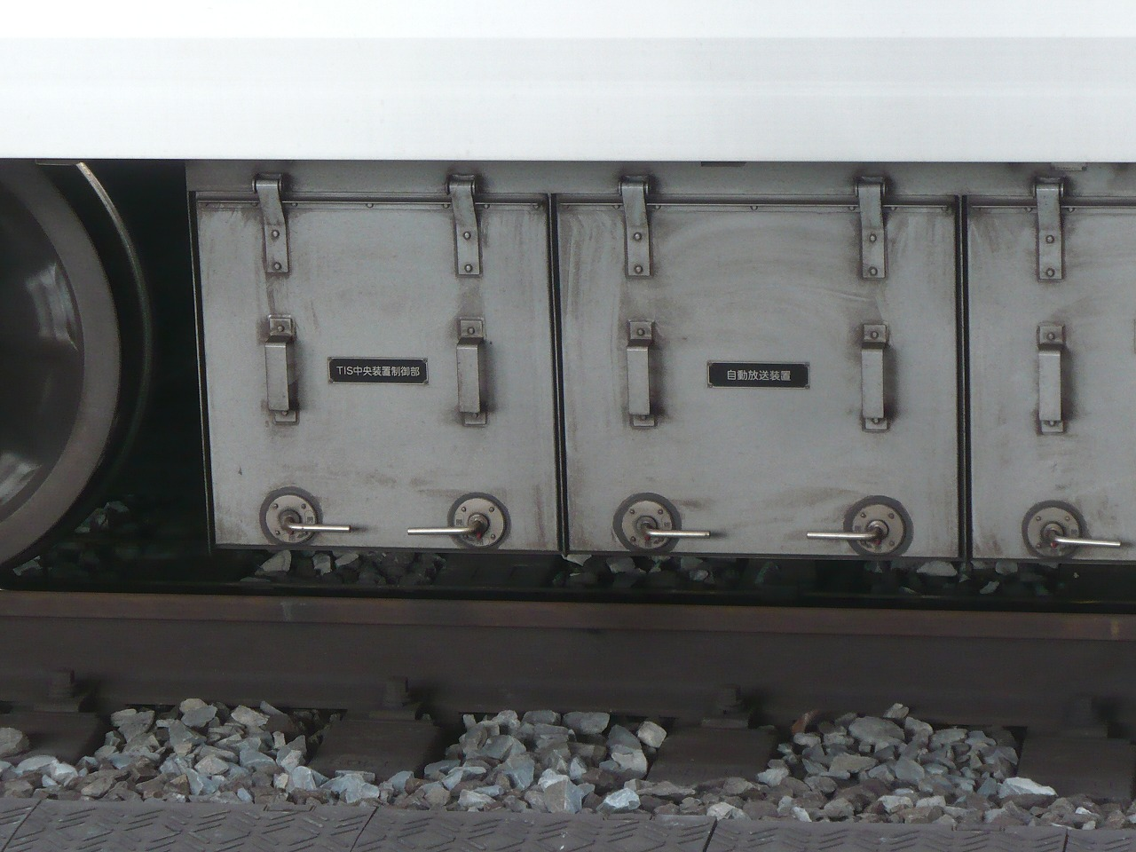 東京メトロ10000系機器